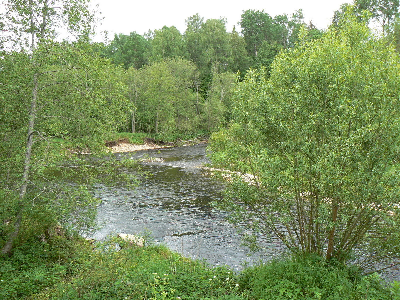 Тьма